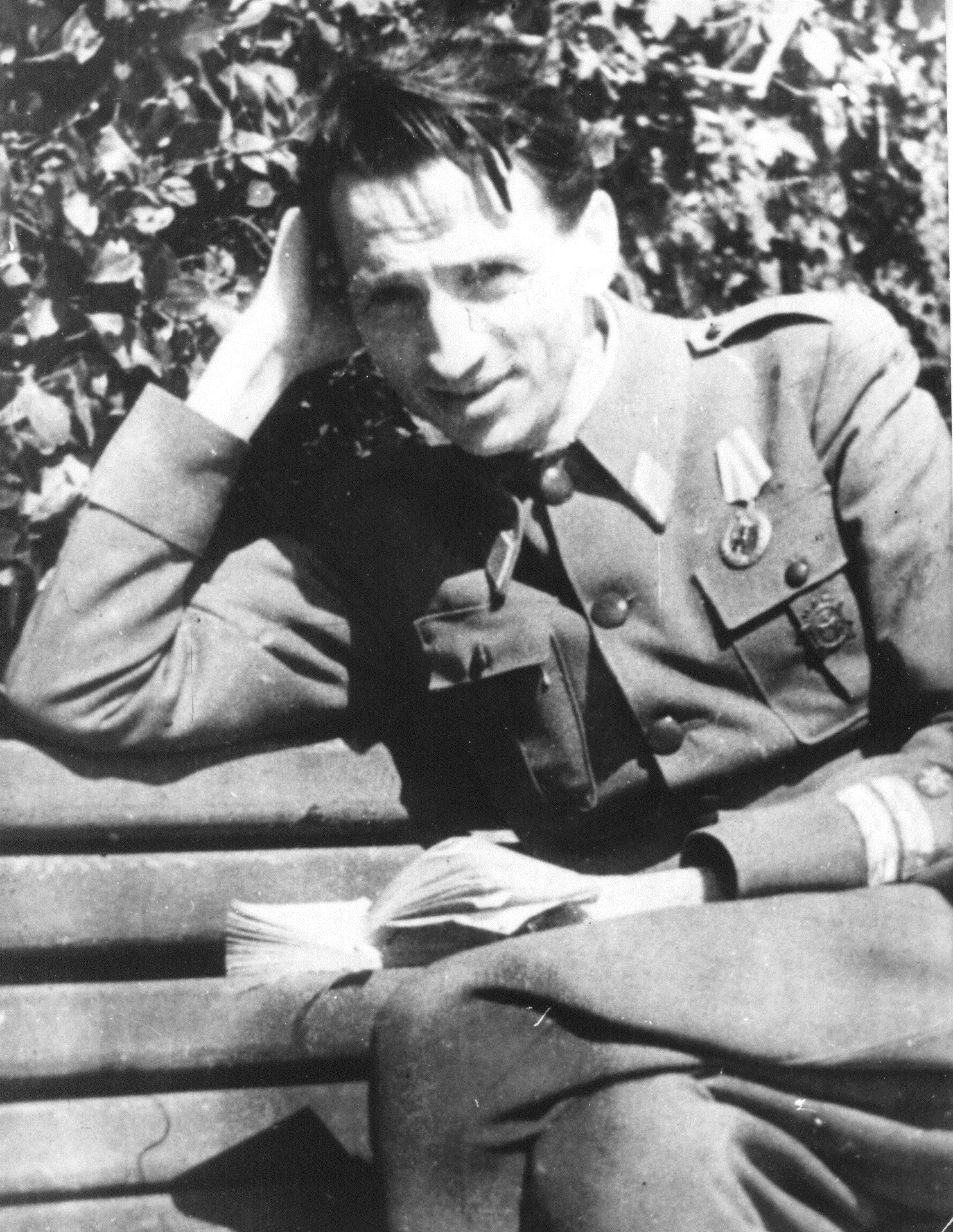 Srpskohrvatski / српскохрватски: Velimir Jakić (Dobra Sela, kod Šavnika, 8. oktobar 1911 — Golnik, 3. oktobar 1946), inežnjer šumarstva, učesnik Narodnooslobodilačke borbe i narodni heroj Jugoslavije.